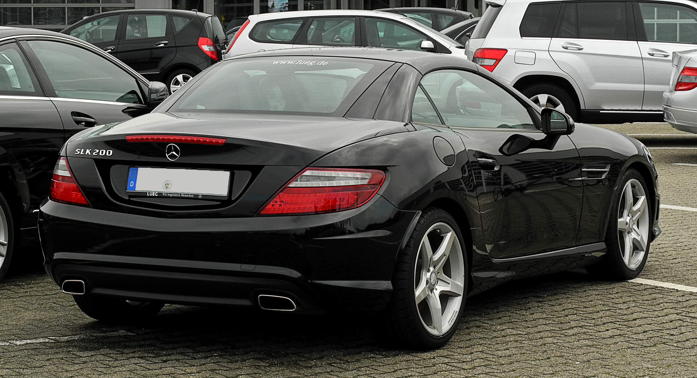 Mercedes-Benz SLK 200 BlueEFFICIENCY Sport-Paket AMG (R 172)